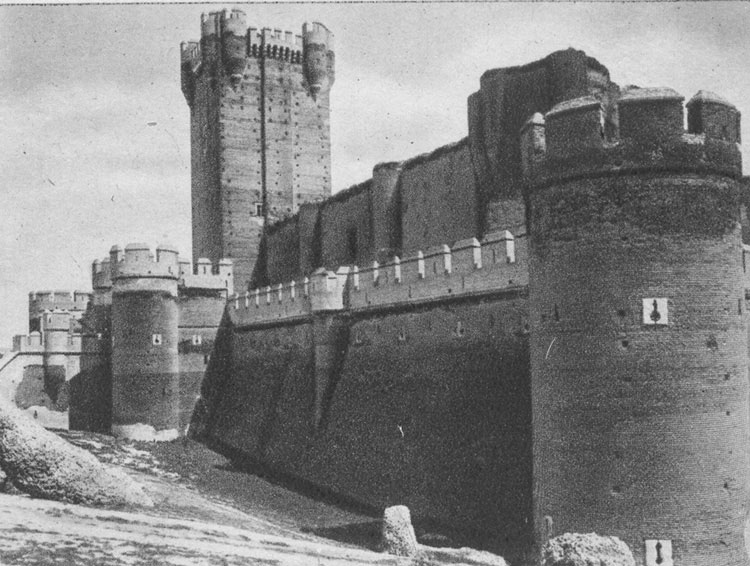 Castillo de la Mota - Medina del Campo (Valladolid) - España Turística y Monumental / Cuarto álbum / Las Bellezas de Castilla / Región Leonesa - Cromo 90 x 70 Sepia